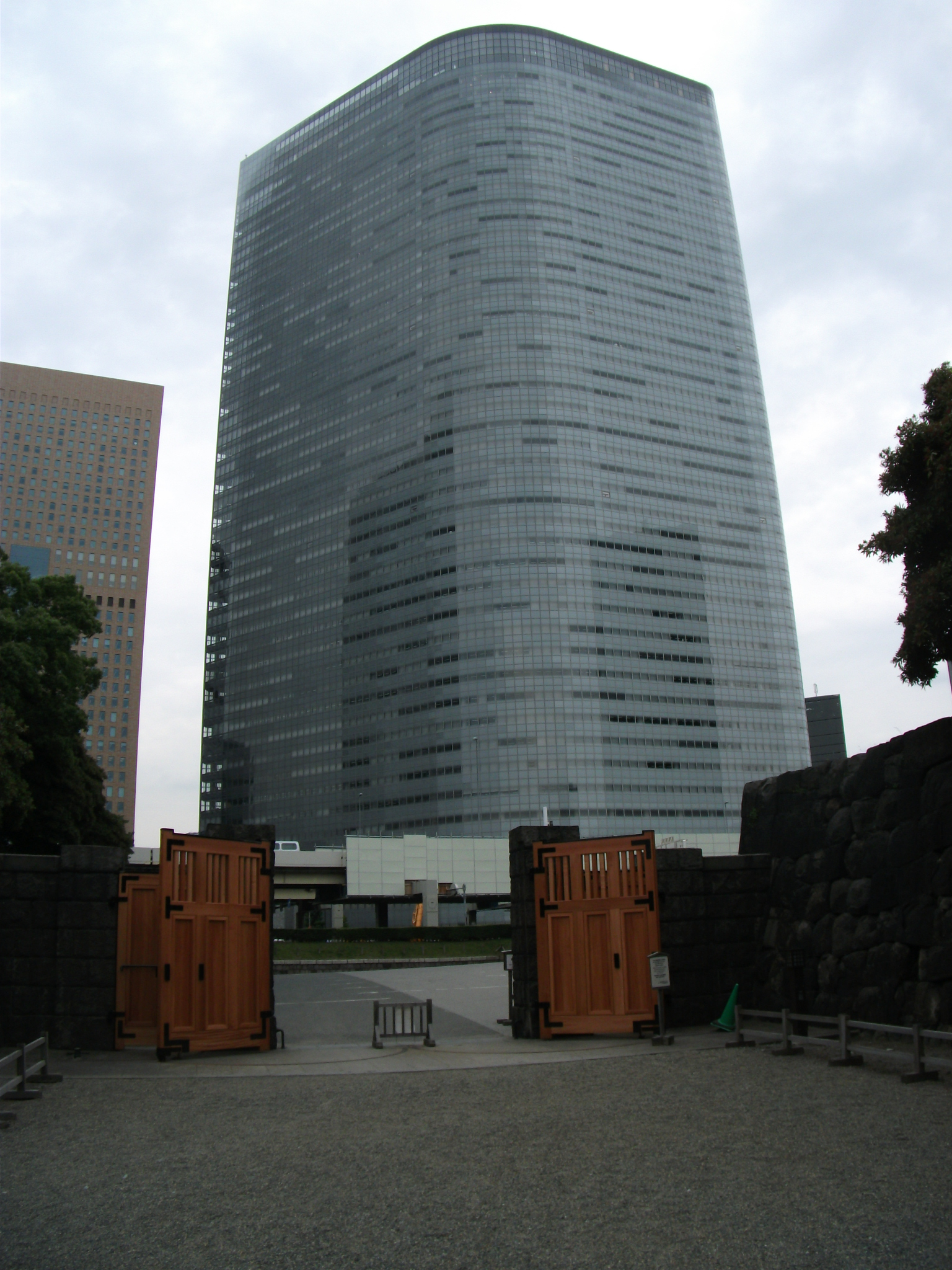 電通本社ビル、浜離宮側より